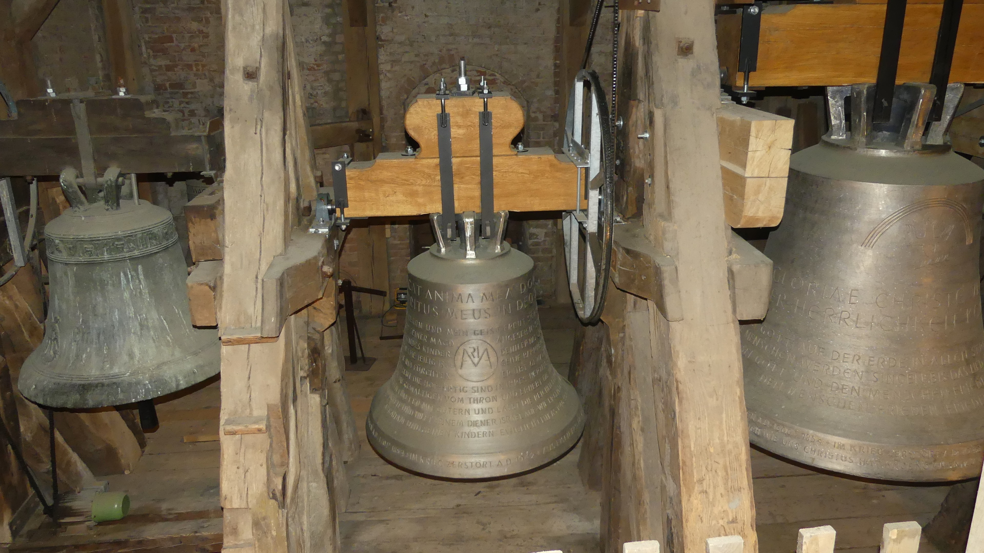 Zwei neue Glocken 2015 und die historische Glocke von 1425